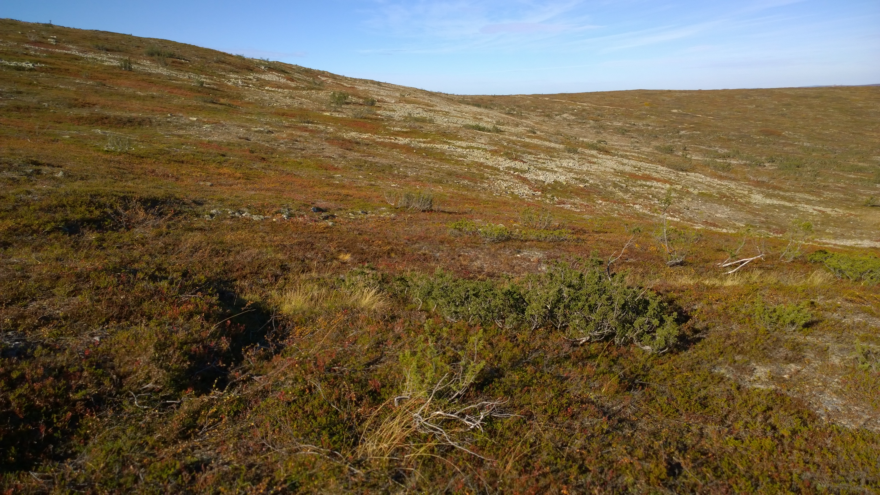 Ruskaa Kiilopään itärinteellä